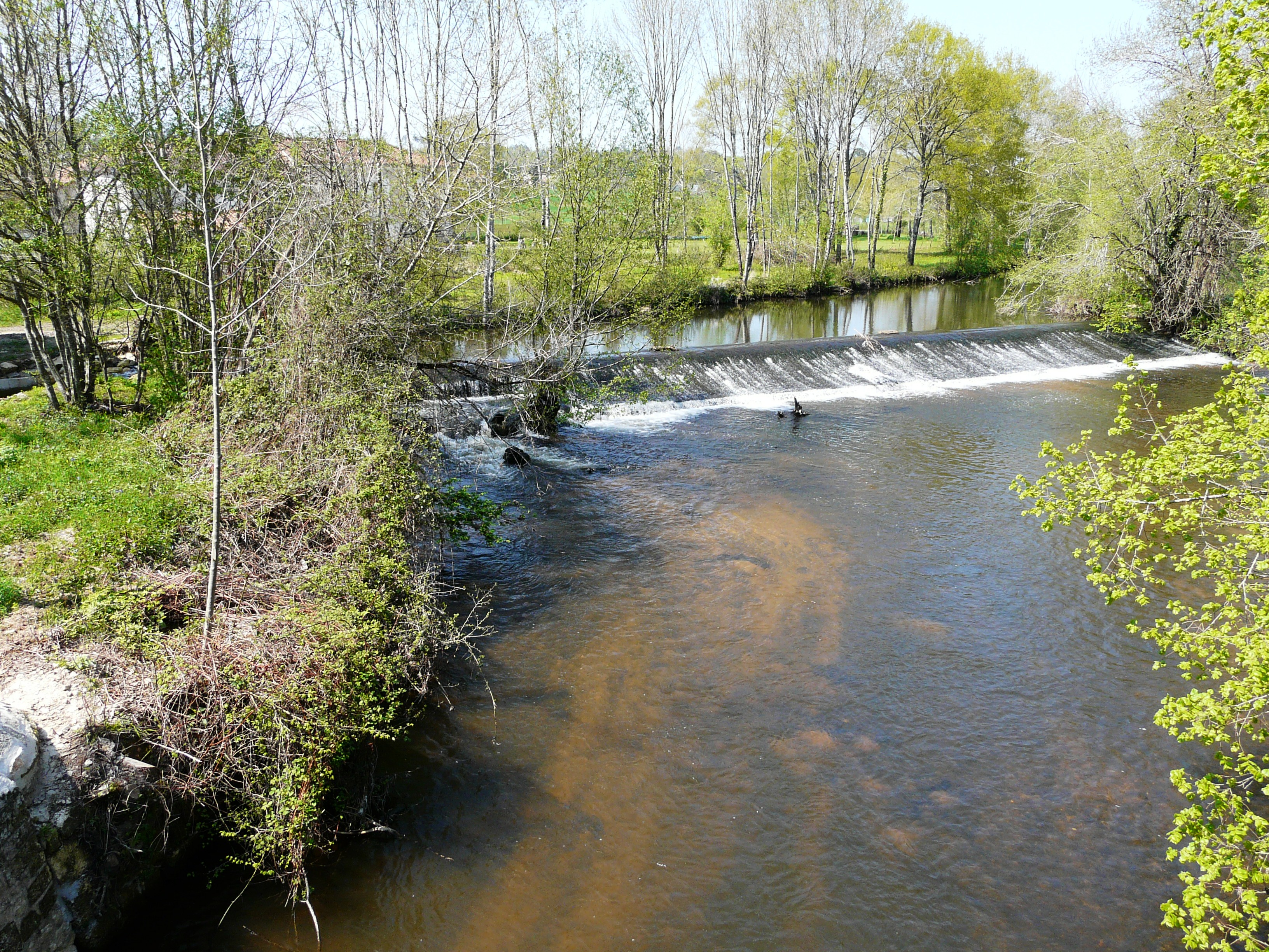 La Dronne en amont du pont de Laumède, Quinsac, Dordogne, France